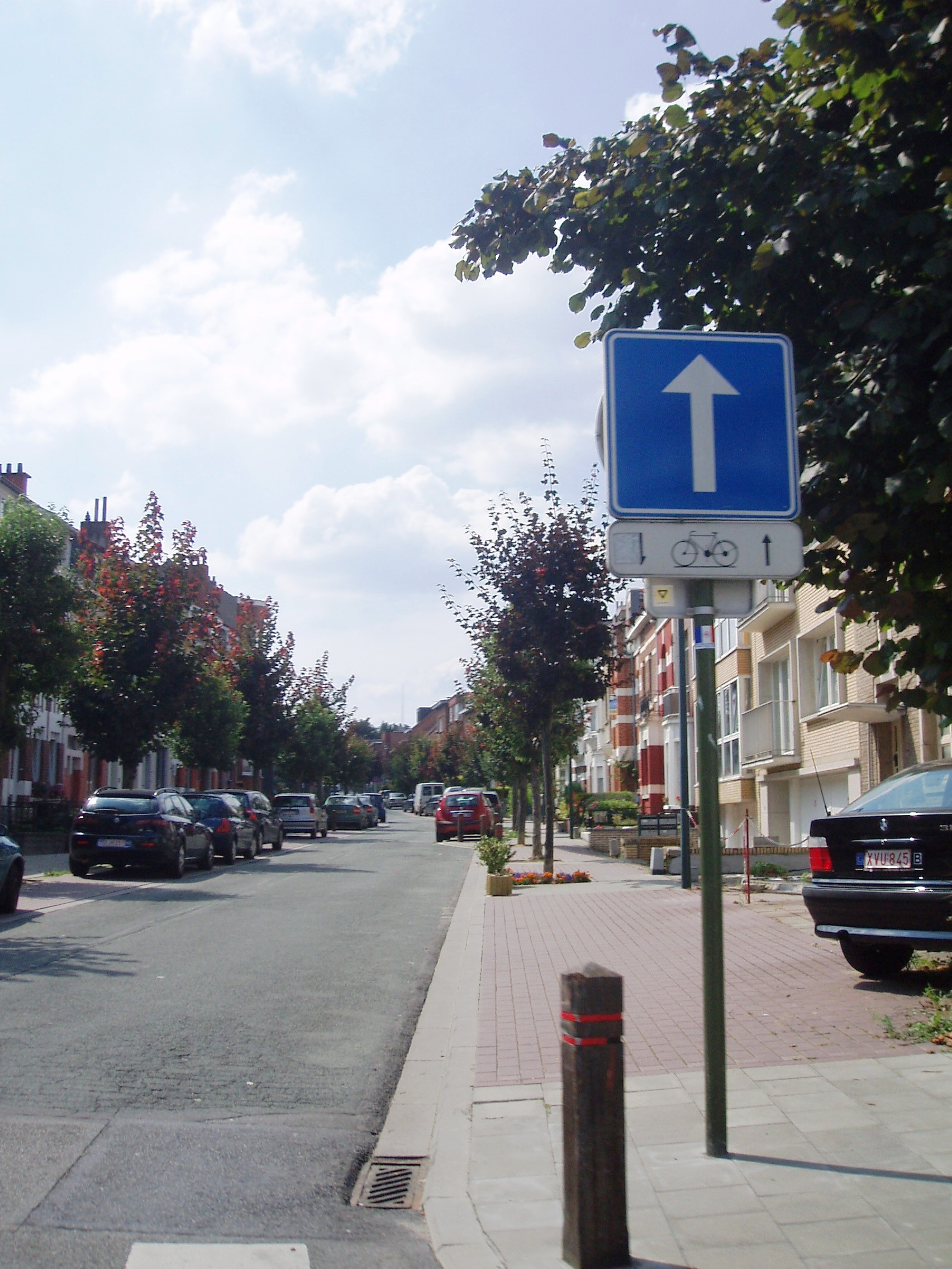 avenue des Meuniers Auderghem Belgium